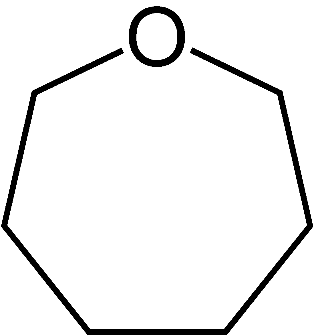 Struktur von Oxepin